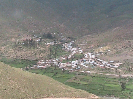 vista panoramica de ocaña